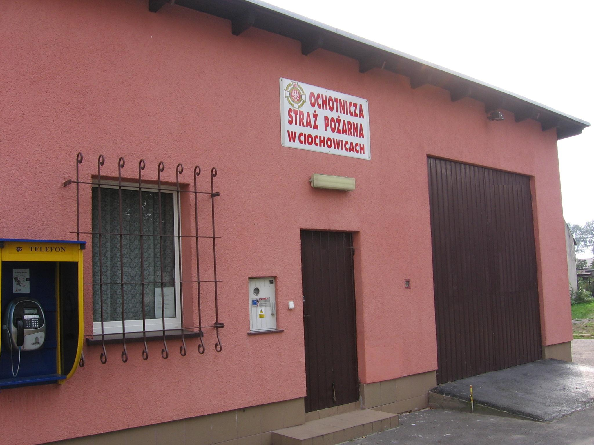 Fotografia przedstawia budynek straży pozarnej. Zdjęcie wykonane zostało aparatem cyfrowym 11.08.2005 przez Genek1000.